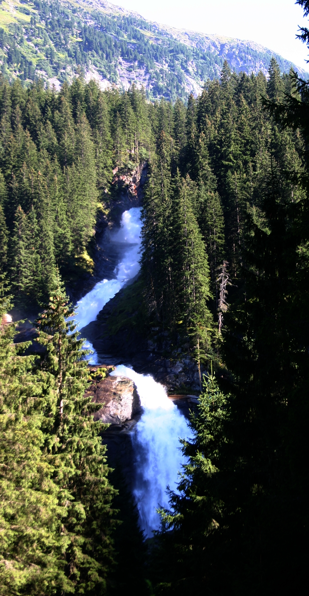 Krimmler Wasserfälle / Krimml Waterfalls in Salzburg, Austria